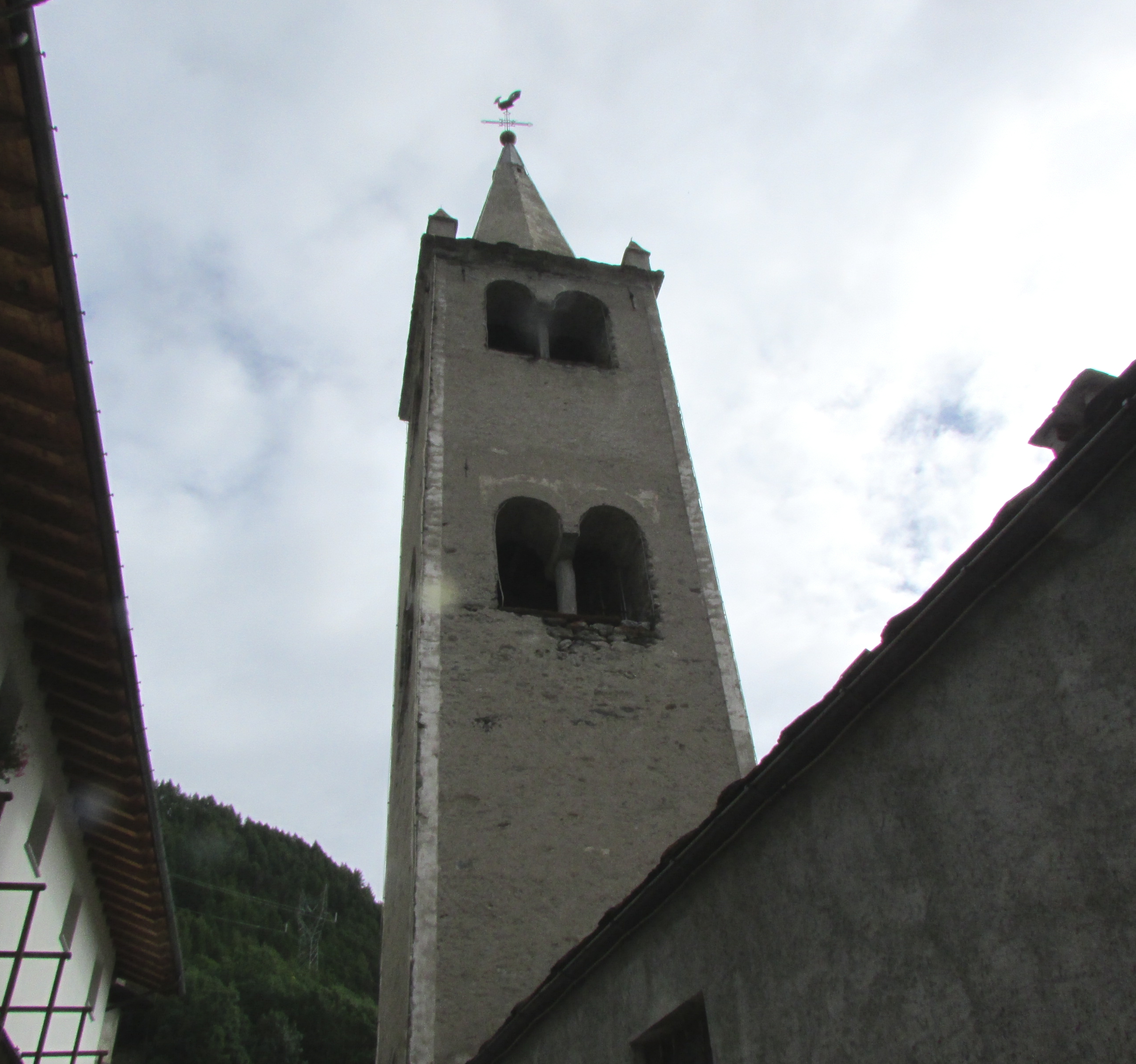 L'eglise de Saint-Oyen.